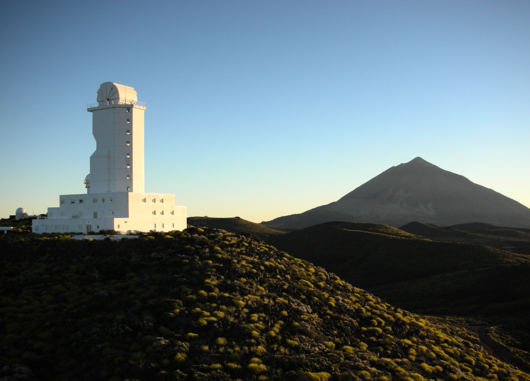 VTT, Teide Observatory